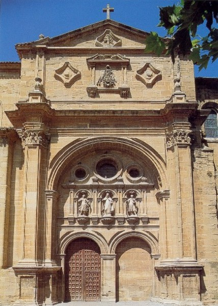 Date du cliché : septembre 2001.